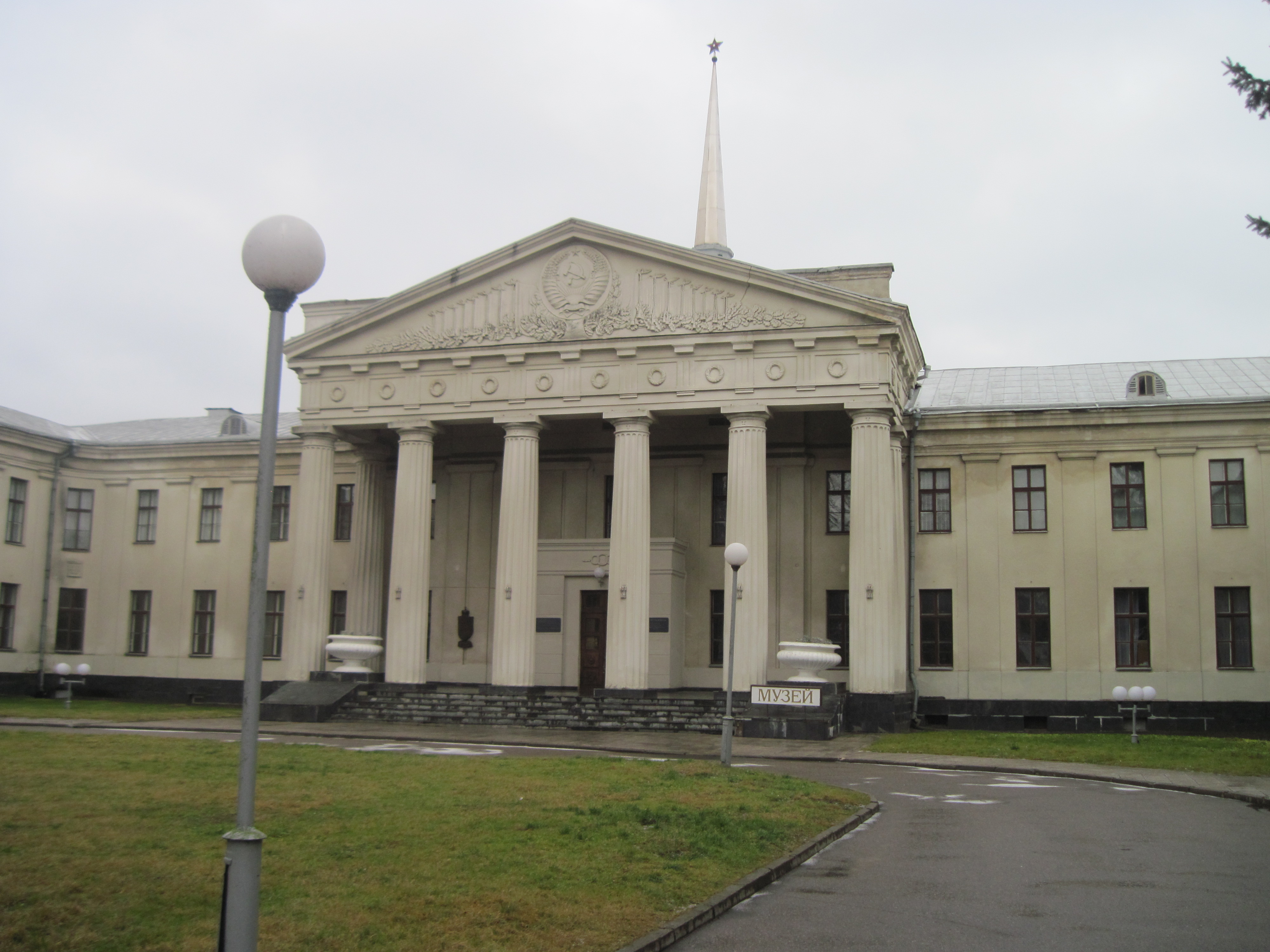 Беларуская (тарашкевіца): Новы Замак у Гродна